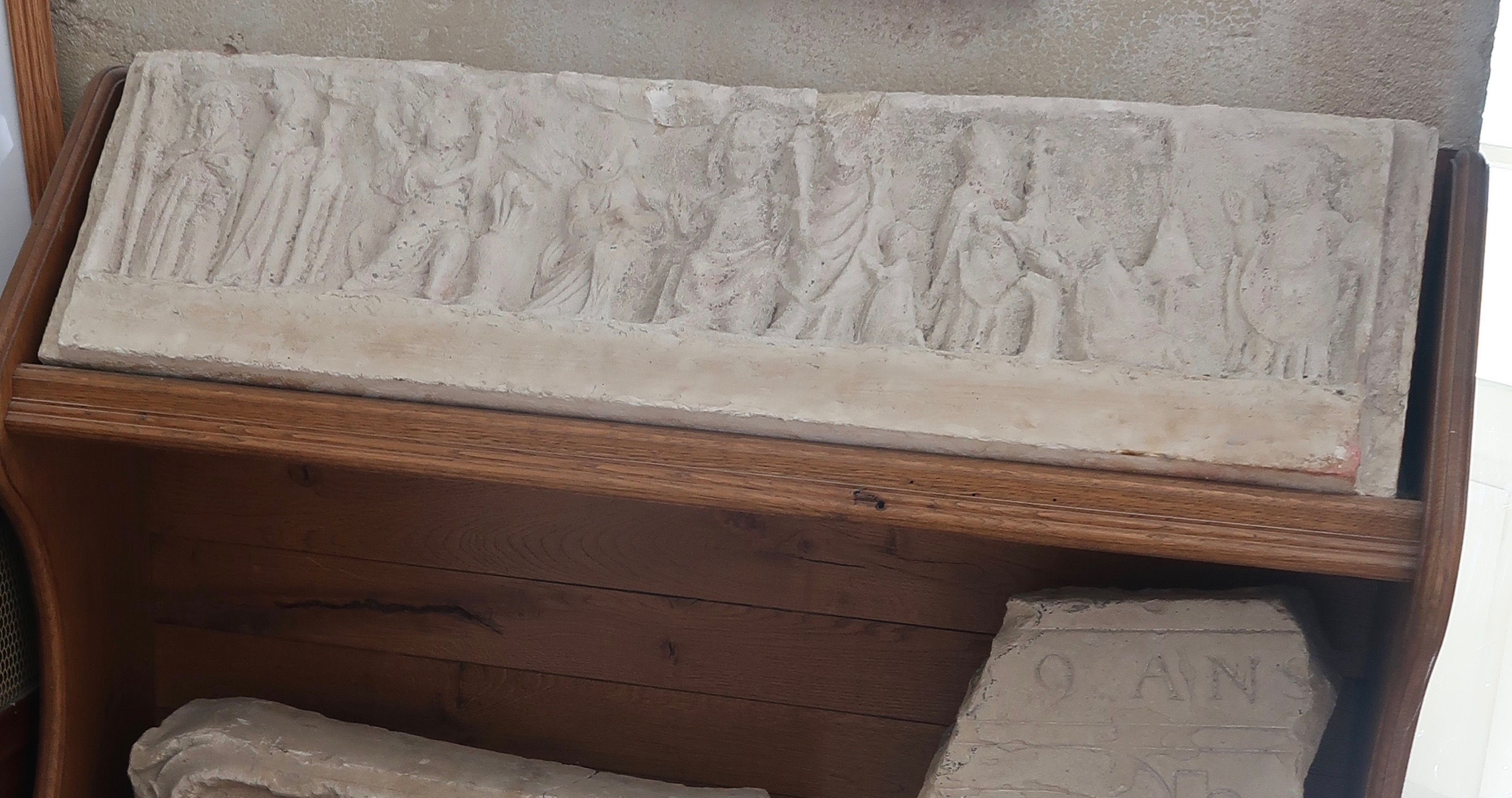 Moule d'un bas-relief de la tombe de Guillemette Faussart, au musée des transmissions du Mont-Valérien à Suresnes (Hauts-de-Seine). L'original est conservé au musée de Suresnes.